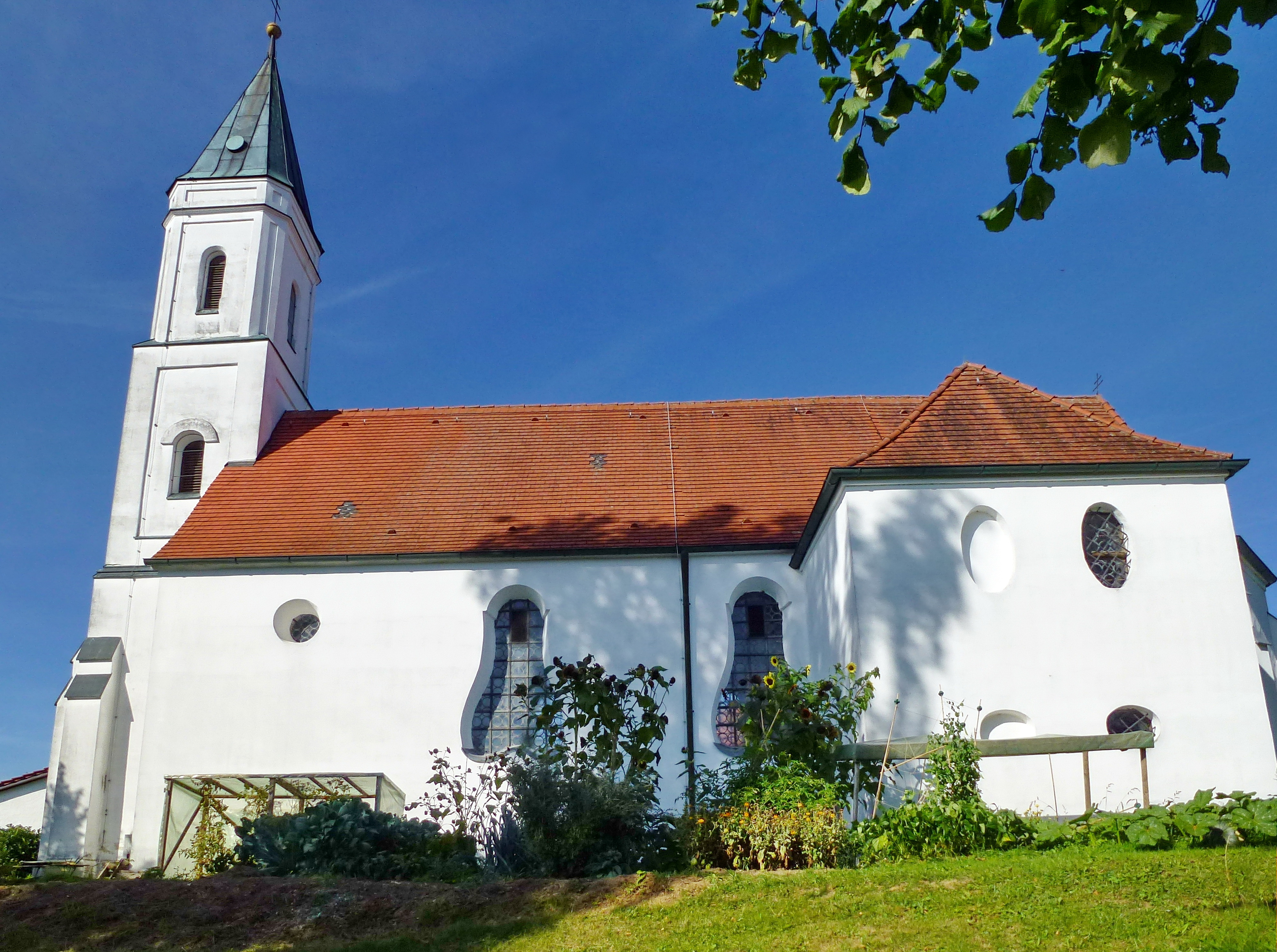 Tandern, Kapelle Unser Liebe Frau. Ansicht von SSO